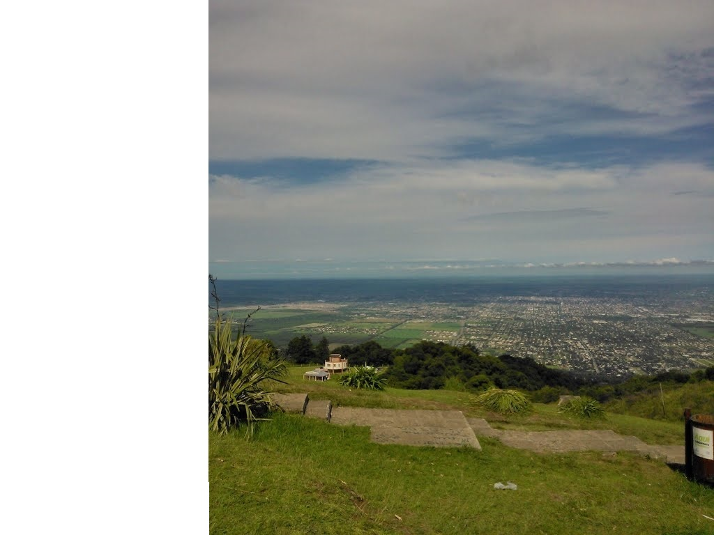 Tucuman